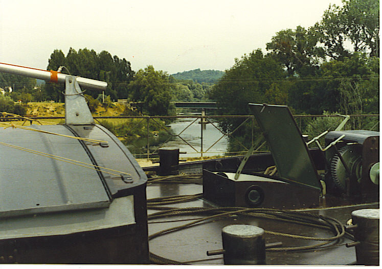 eigen foto